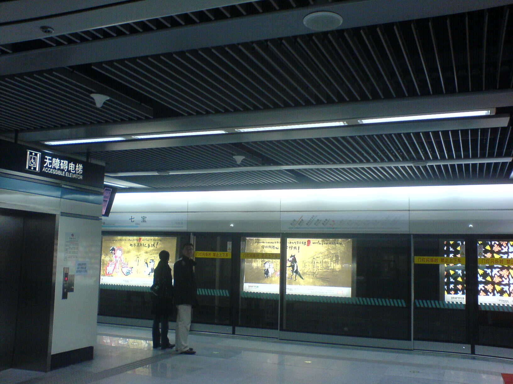 七宝站站台